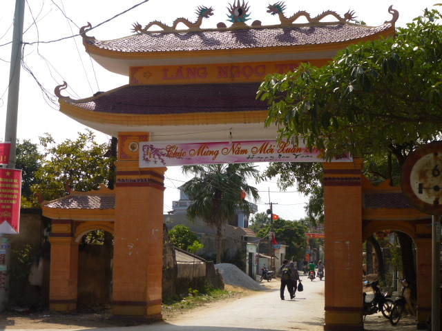 Cổng làng Ngọc Trà, xã Quảng Trung, Quảng Xương, Thanh Hóa, Việt Nam